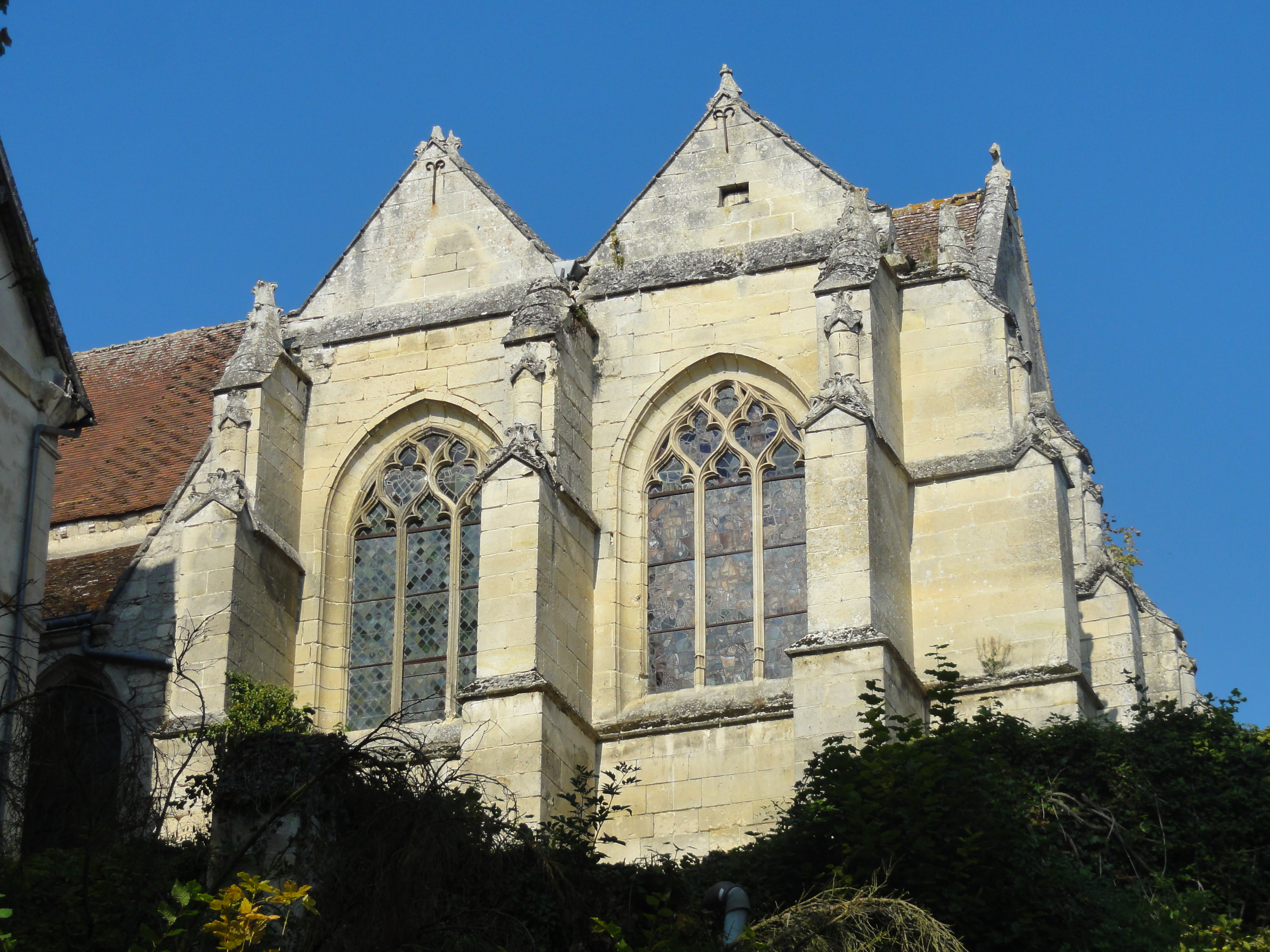 Église Saint-Rémi d'Orrouy - voir titre.